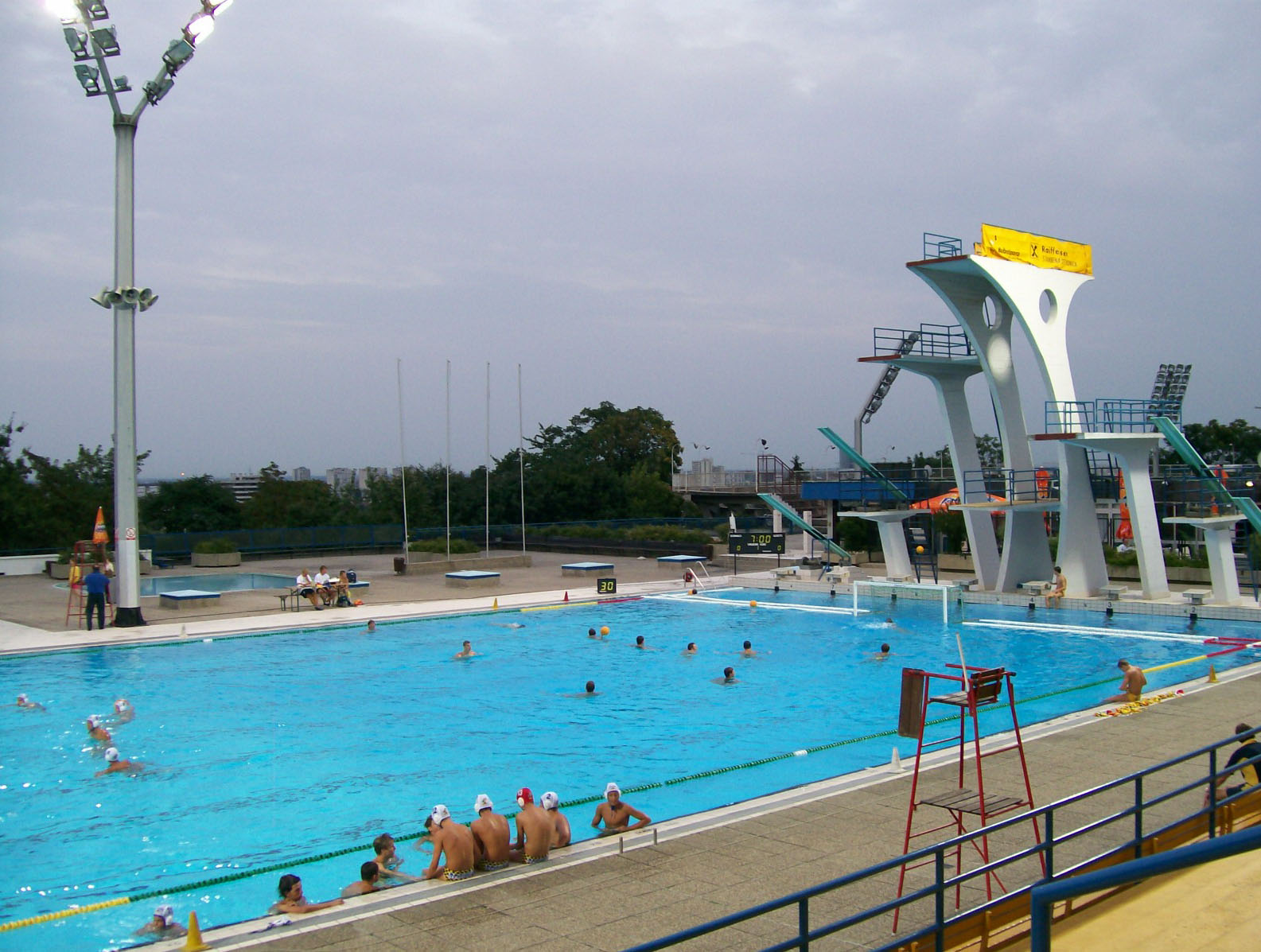 Bazeni na Šalati